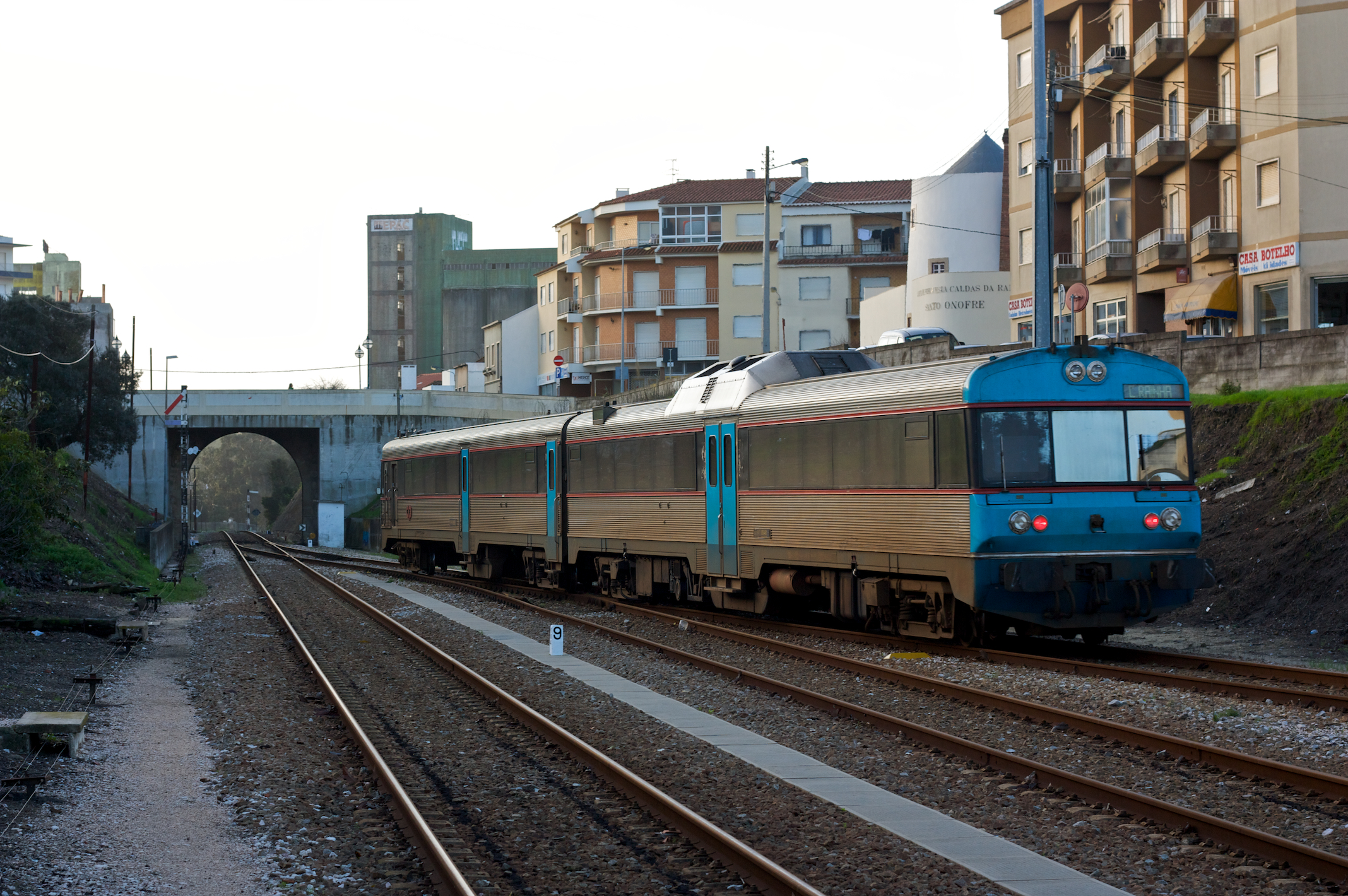 Tipo: Comboio InterRegional 806 [Caldas da Rainha - Entrecampos • Poente] Local: Estação de Caldas da Rainha [Linha do Oeste, PK 105] Data e hora: 24 de Janeiro de 2009 [08h28] Material: Automotora 0461 [Unidade Dupla Diesel]